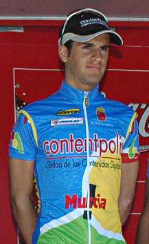 Javier Etxarri. Contentpolis-Murcia, Euskal Bizikleta 2008